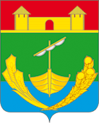 Герб Мичуринского района, Тамбовская область